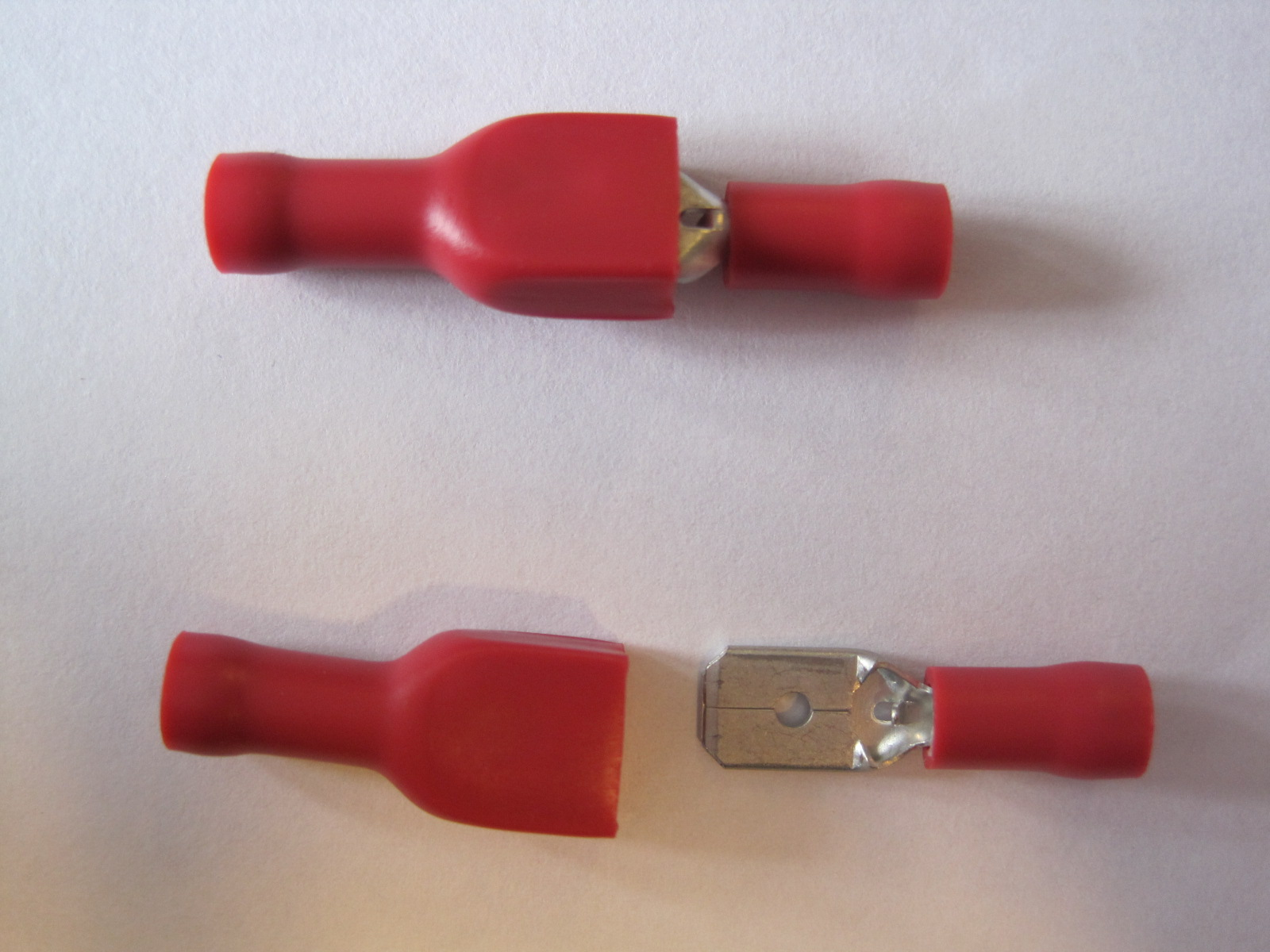 Billedet viser fire kabelsko.